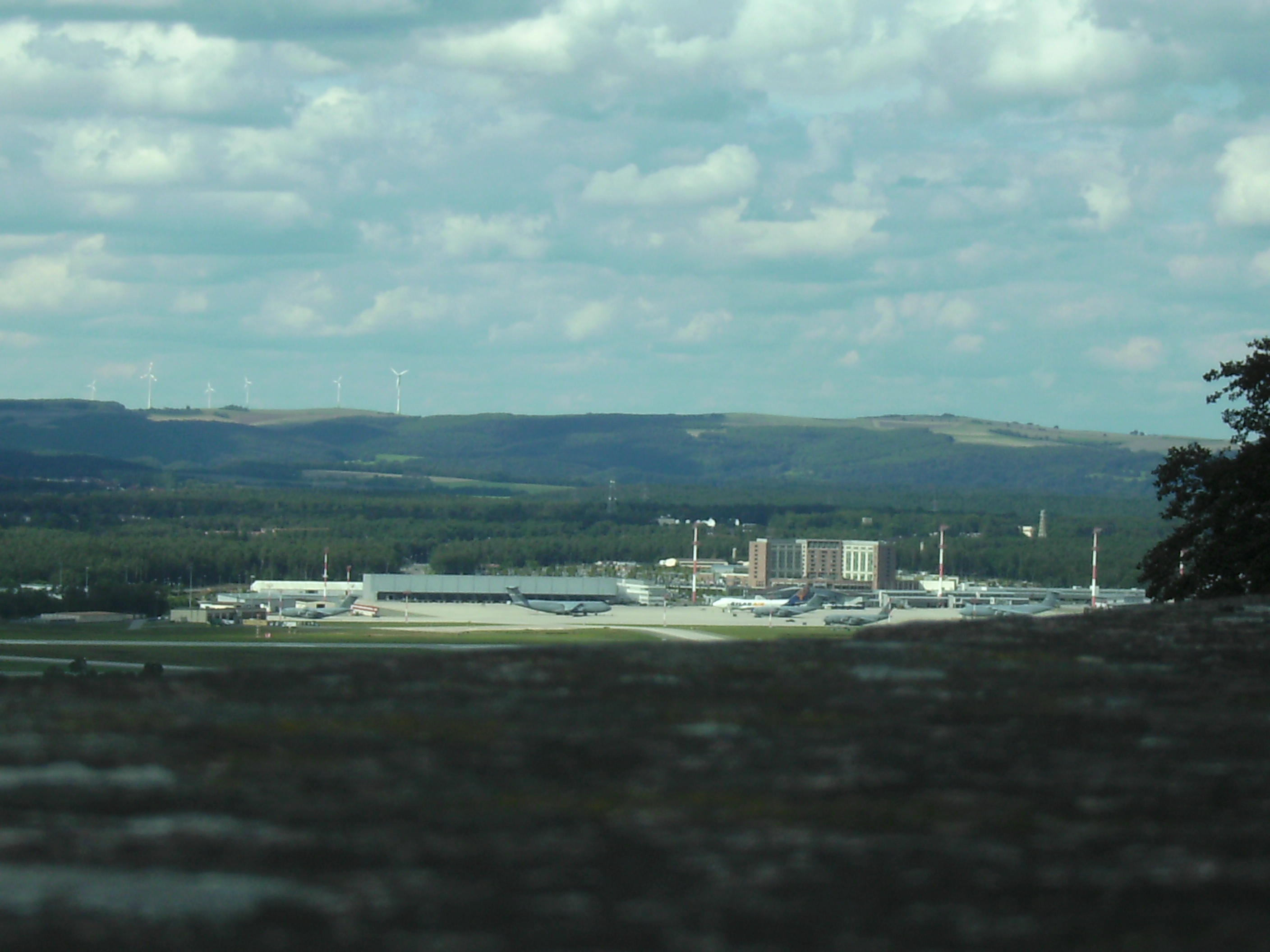 Ramstein: Amerikanische Air Base (Zentralgebäude mit Flugfeld), von Burg Nanstein aus gesehen